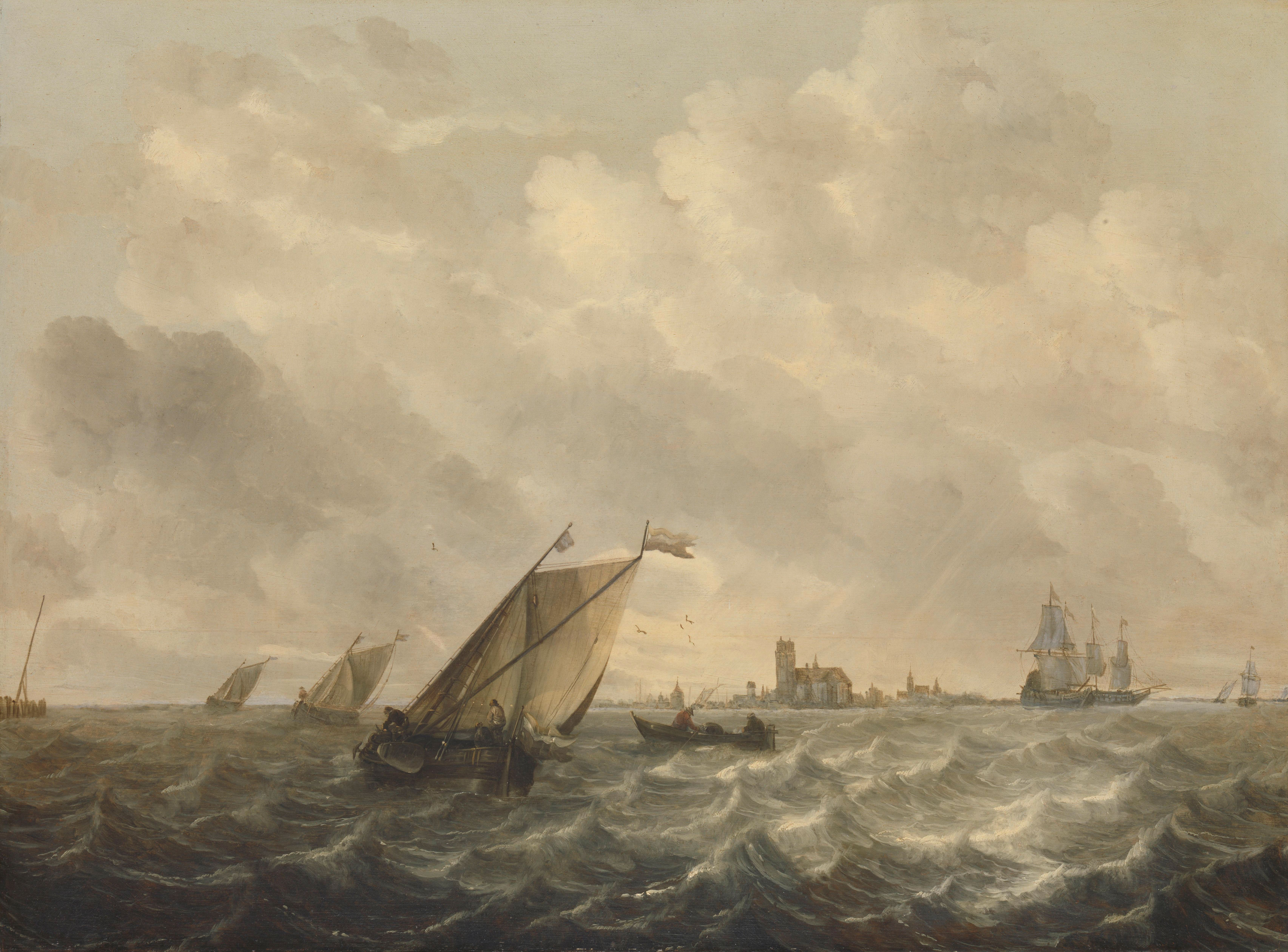 Riviergezicht. Schepen en bootjes op woelig water met in de verte een stadsprofiel (Dordrecht?).